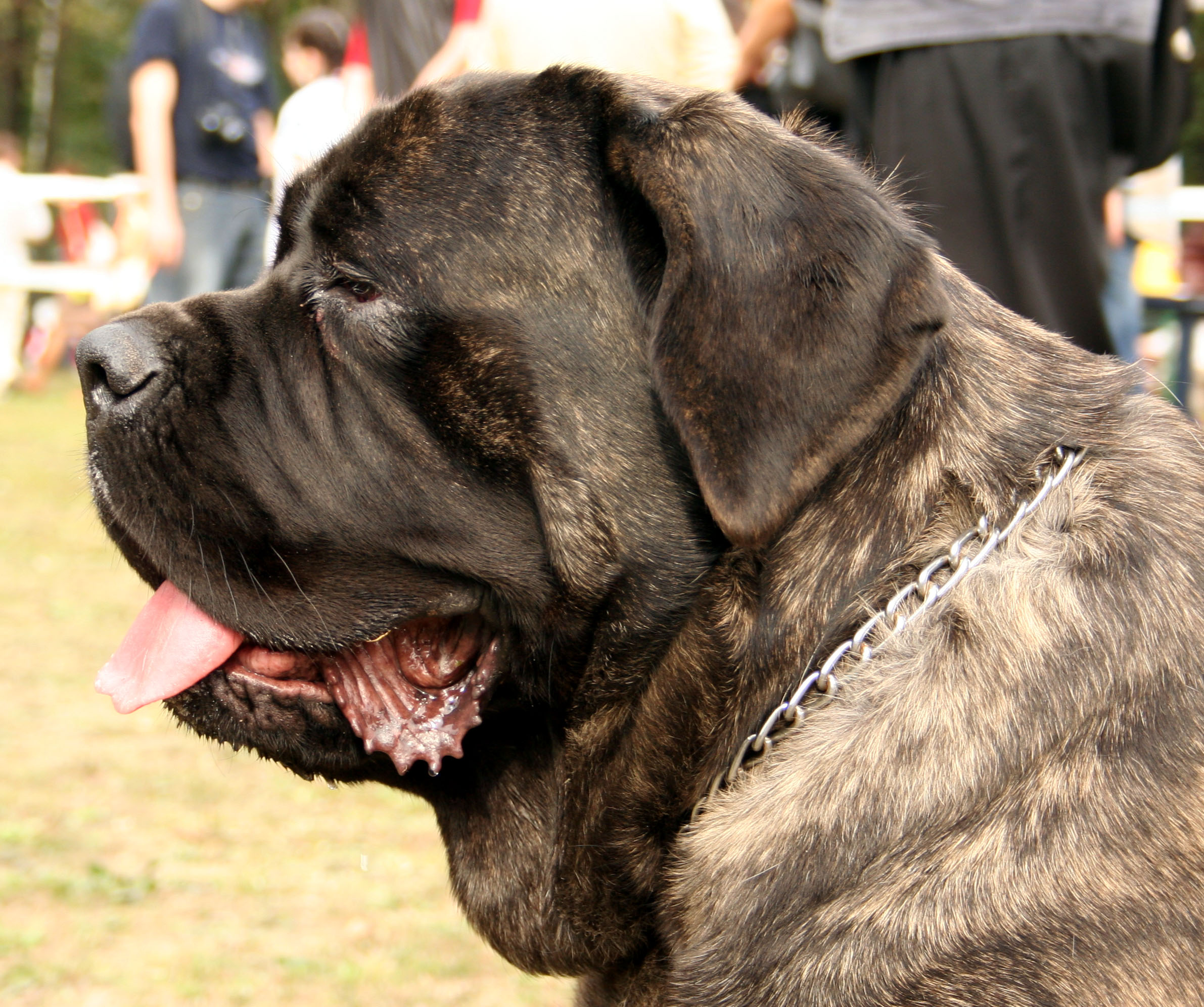 Mastif_angielski_pręgowany na krajowej wystawie w Rybniku - Kamieniu